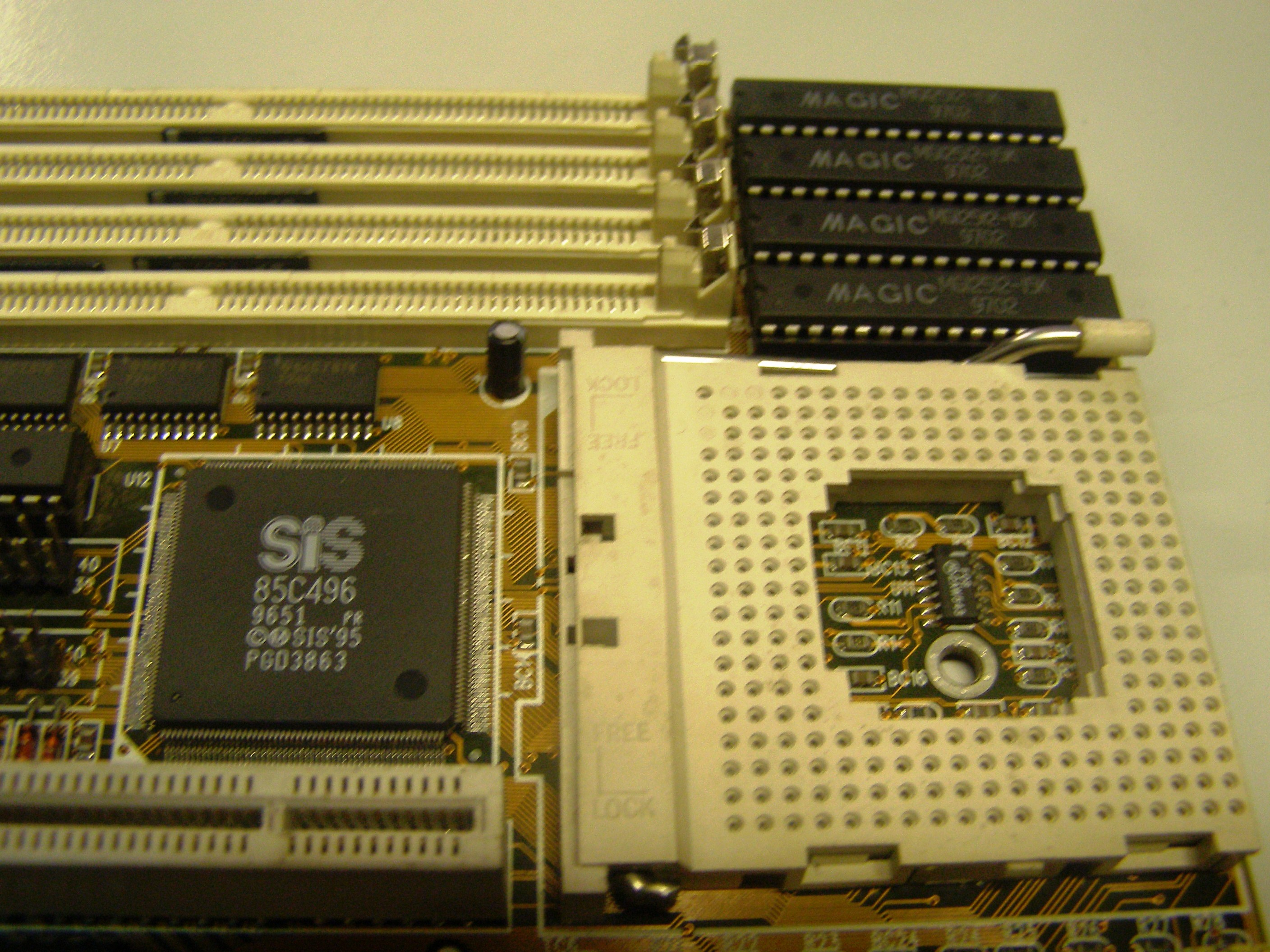 Процессорный разъём на материнской плате с чипсетом SIS496/497. Четыре микросхемы - кэш второго уровня ОЗУ статического типа.